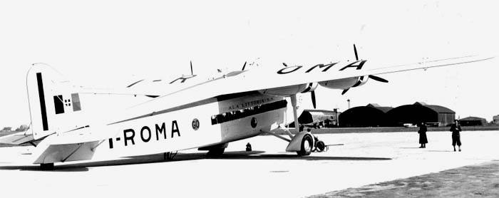 Aereo Savoia Marchetti S.74